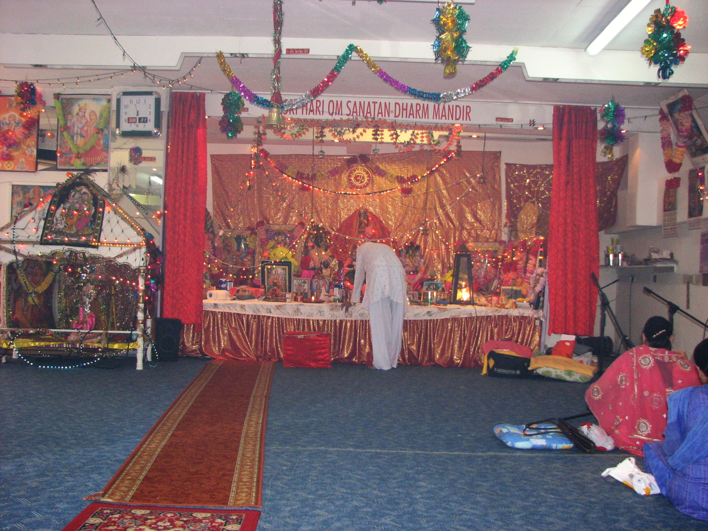 Hindu Mandir in Salzburg